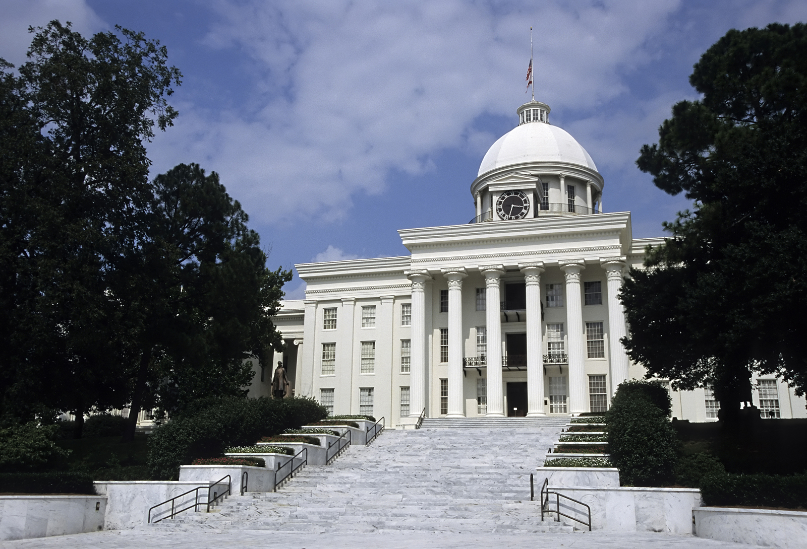 Alabama State Capitol Dome Interior